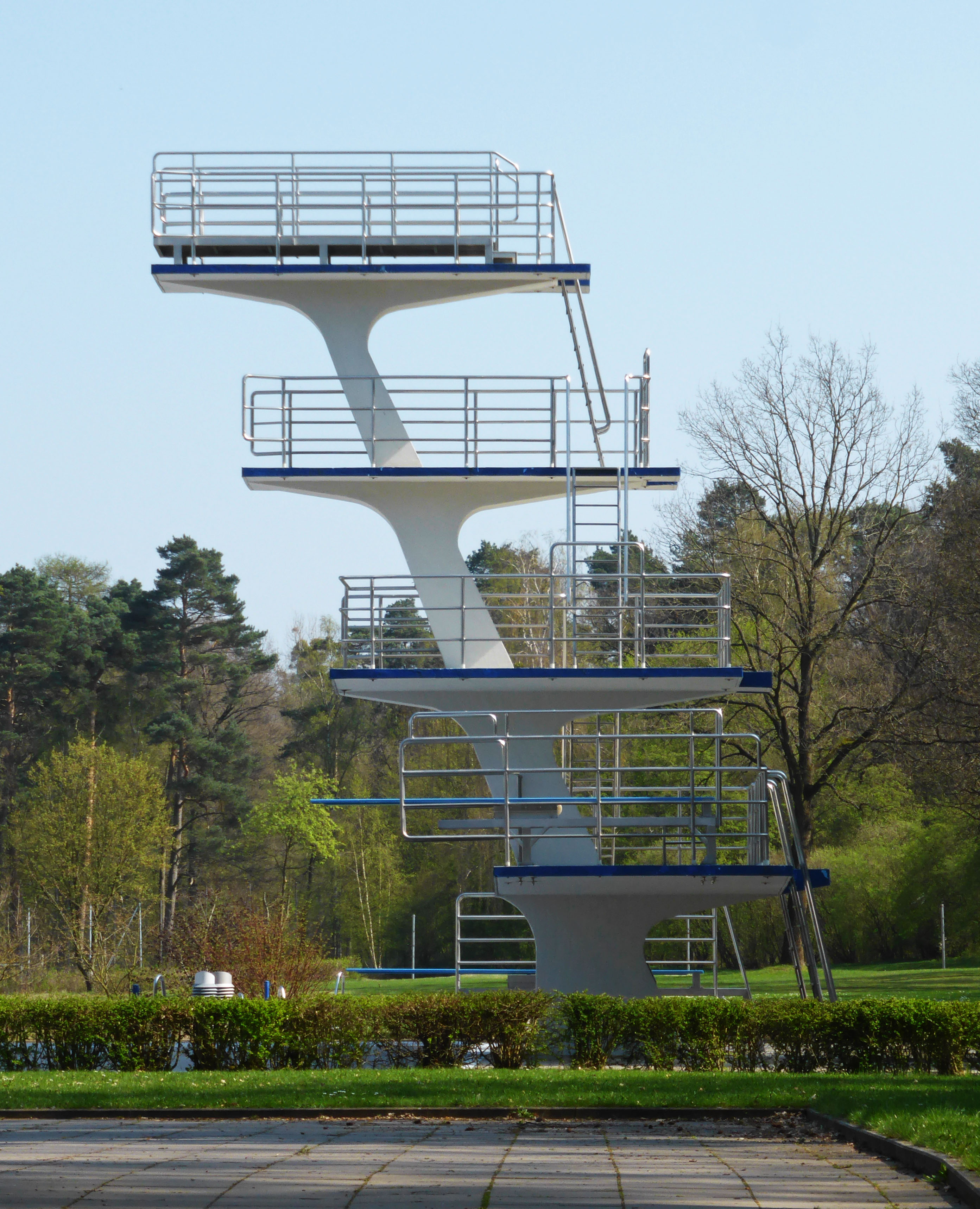 Sprungturm des VW-Bades in Wolfsburg.